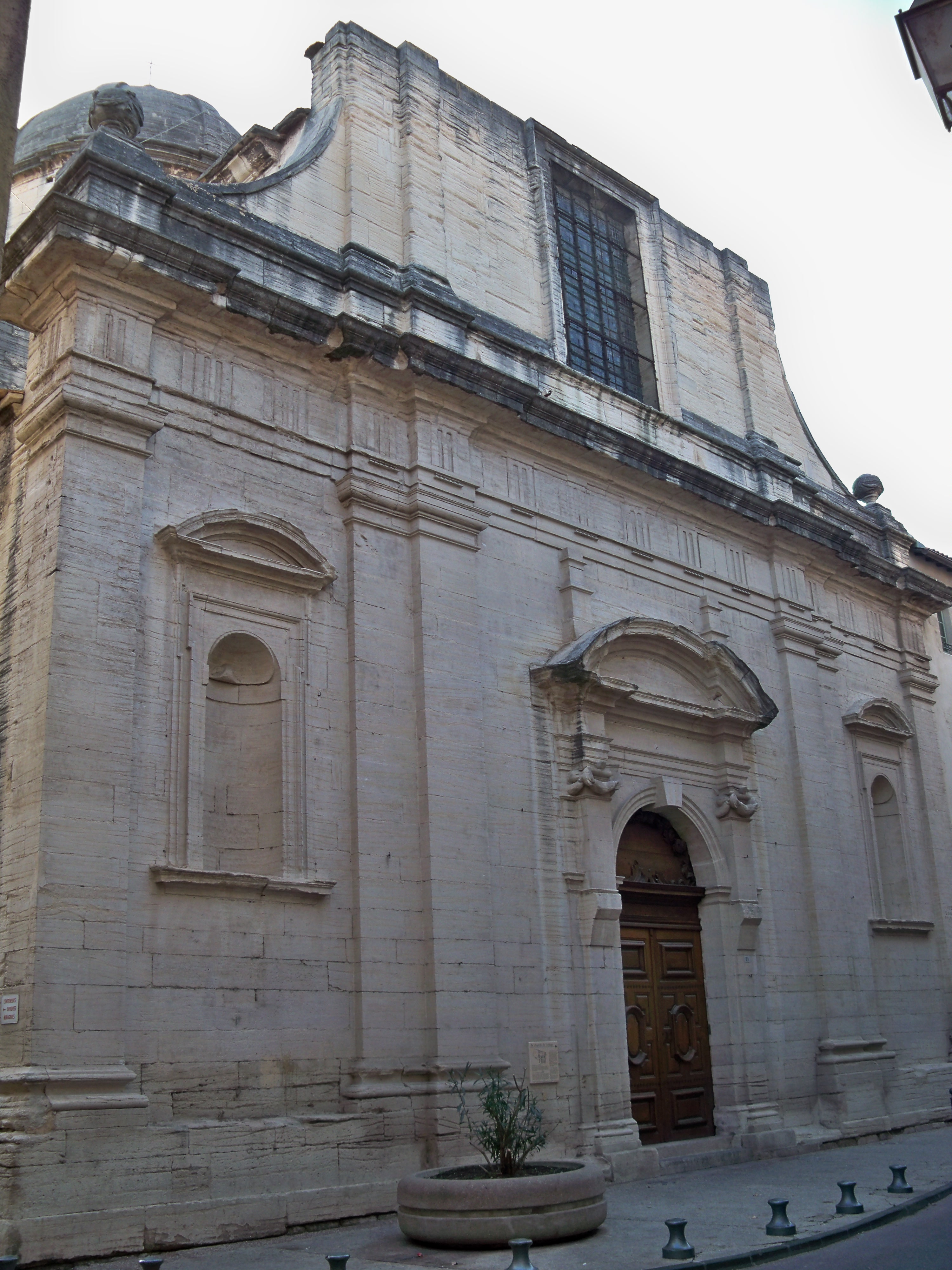 Chapelle du Collège à Carpentras (Vaucluse, France)